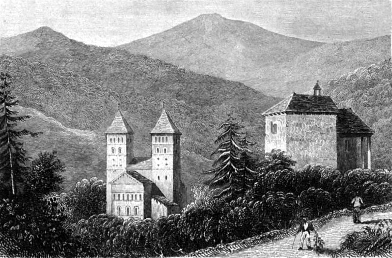 « Vallée de Murbach » Image en provenance du livre : Eusèbe Girault de Saint-Fargeau, Guide pittoresque du voyageur en France, contenant la statistique et la description complète des quatre-vingt-six départements, orné de 740 vignettes et portraits gravés sur acier, de quatre-vingt-six cartes de départements et d'une grande carte routière de la France, par une Société de gens de lettres, de géographes et d'artistes, Paris, F. Didot frères, 1838, 6 volumes in-8° (BNF : 8-L25- 46). Volume III Route de Paris à Nice traversant les départements de l'Isère, des Hautes-Alpes, des Basses-Alpes et du Var. auteurs dessins : Rauch (ou autre) auteurs gravures : Skelton fils, Schroeder, Bishop (ou autre)